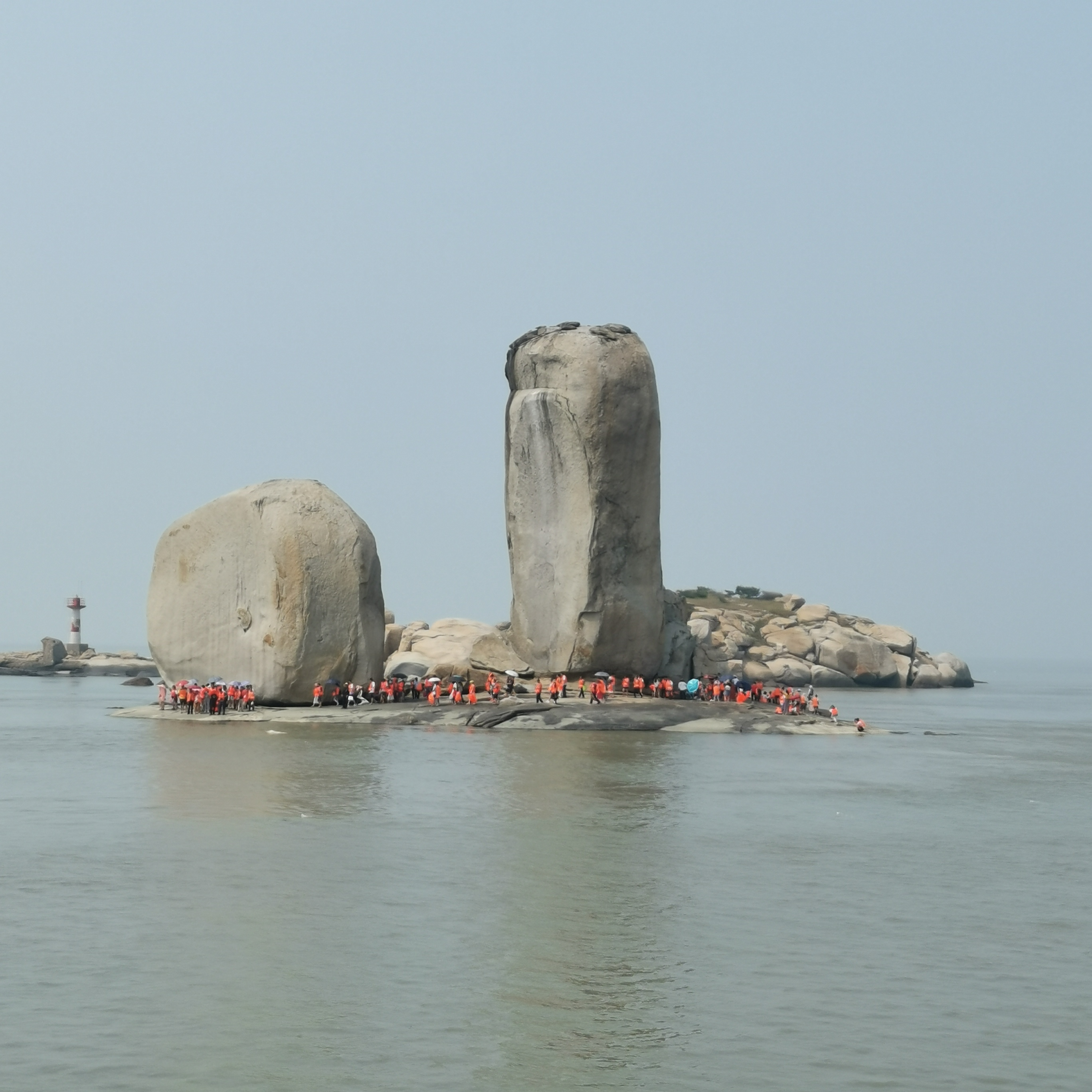 中文（中国大陆）: 石牌洋